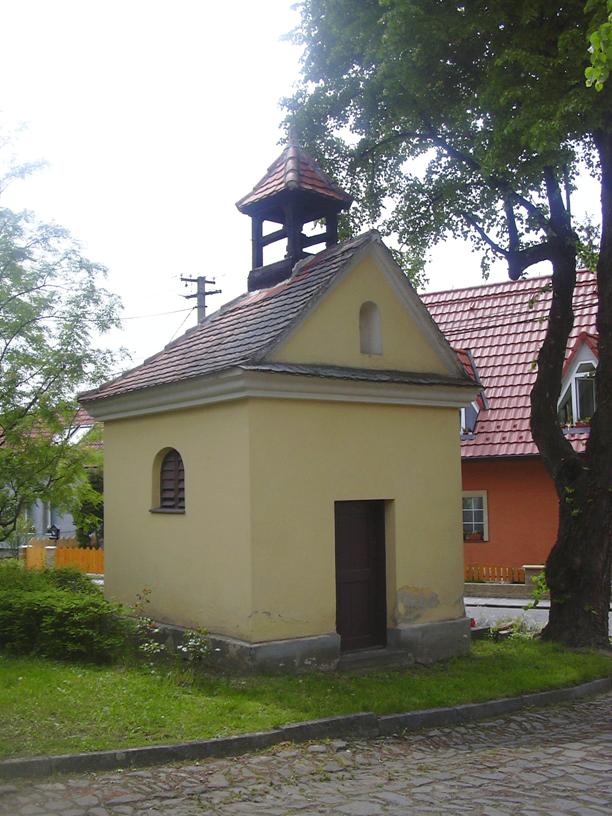 Zvonice - Boškůvky (Vyškov District - Czech republic)